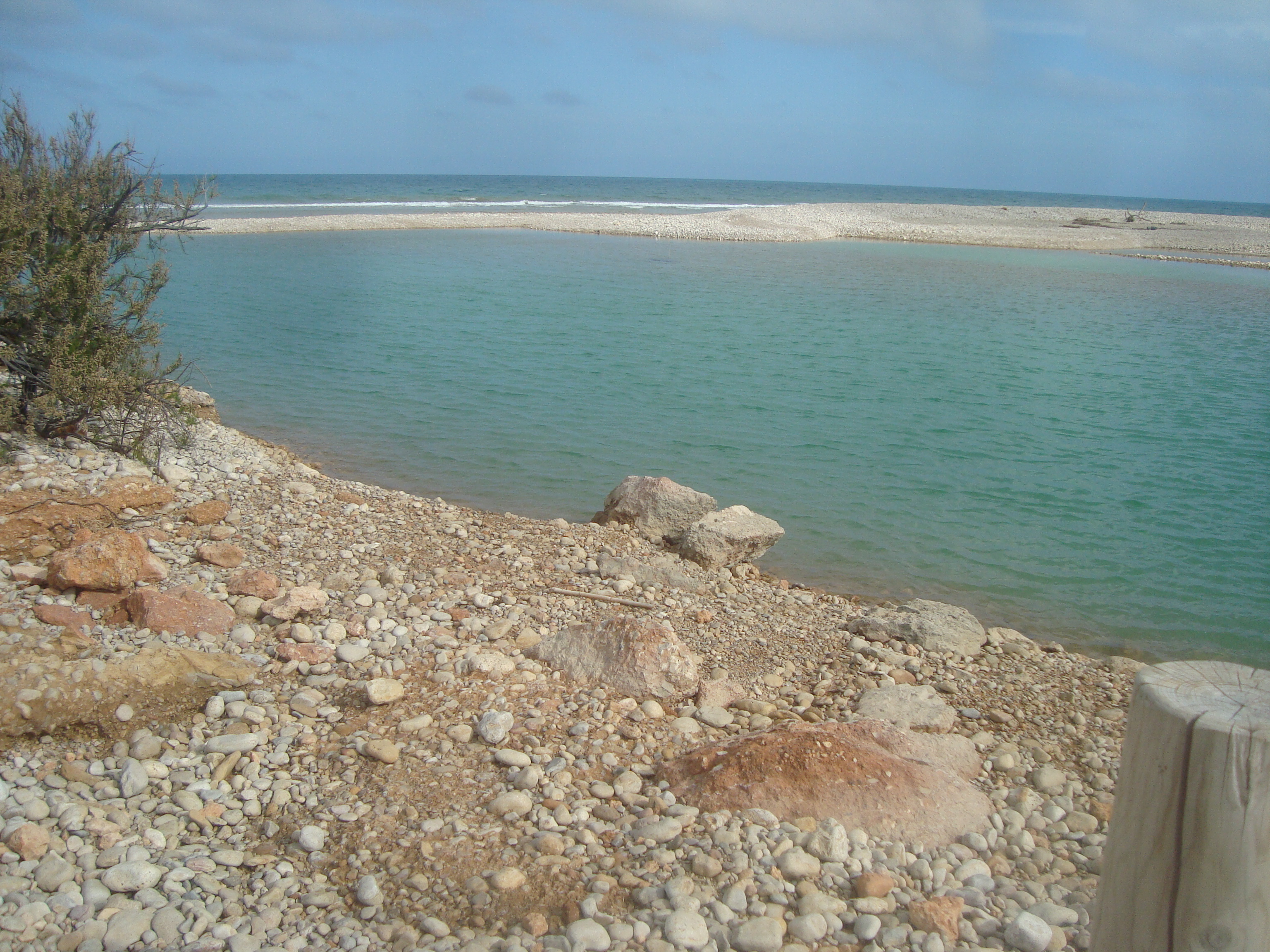 Zona humida de la desembocadura del riu de les Coves (Alcalà de Xivert)